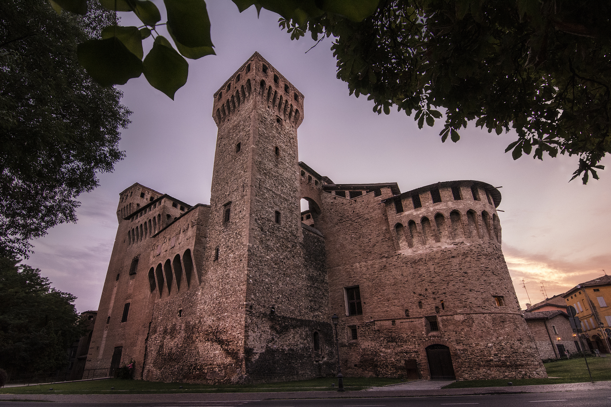 Rocca di Vignola This is a photo of a monument which is part of cultural heritage of Italy.